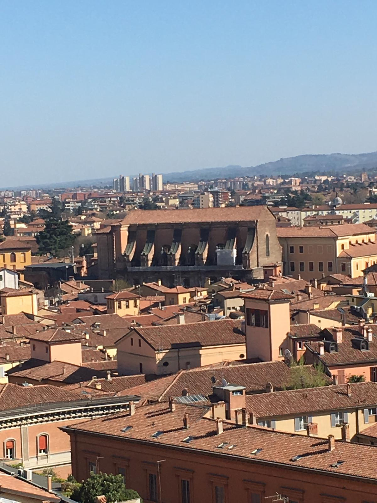 Foto dell'ex chiesa di S. Lucia scattata da delle impalcature aperte a terrazza panoramica. This is a photo of a monument which is part of cultural heritage of Italy.